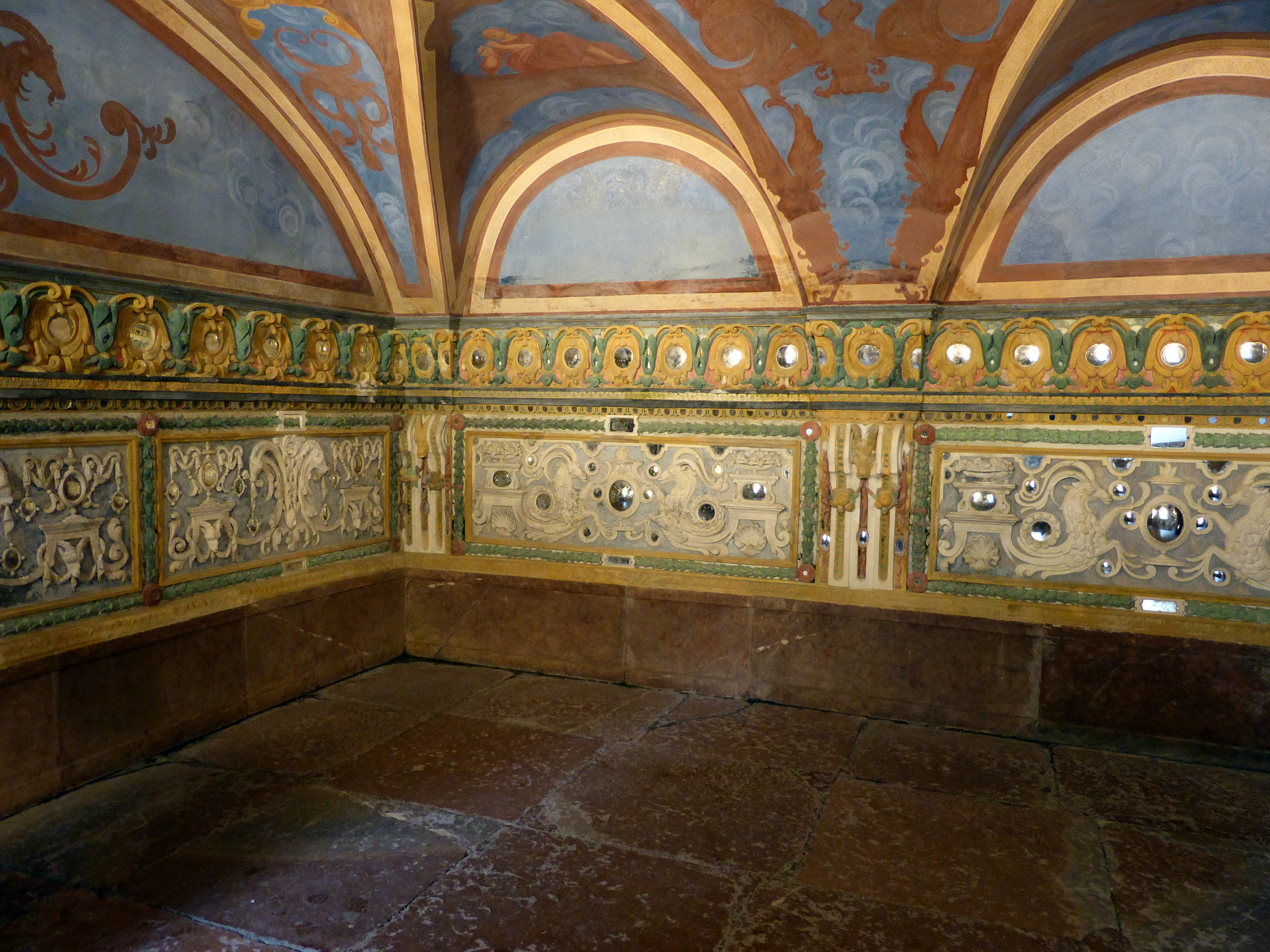 Wasserspiele Schloss Hellbrunn (Spiegelgrotte), Salzburg.